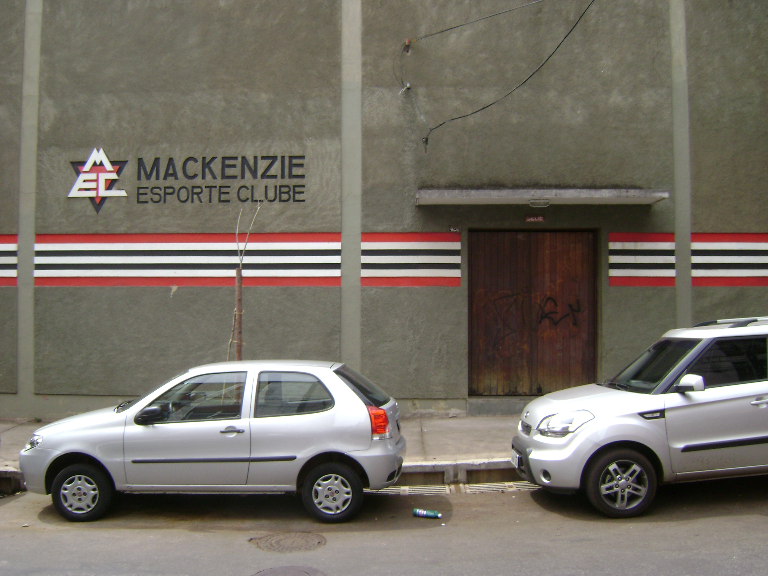 Entrada do Mackenzie em Belo Horizonte.